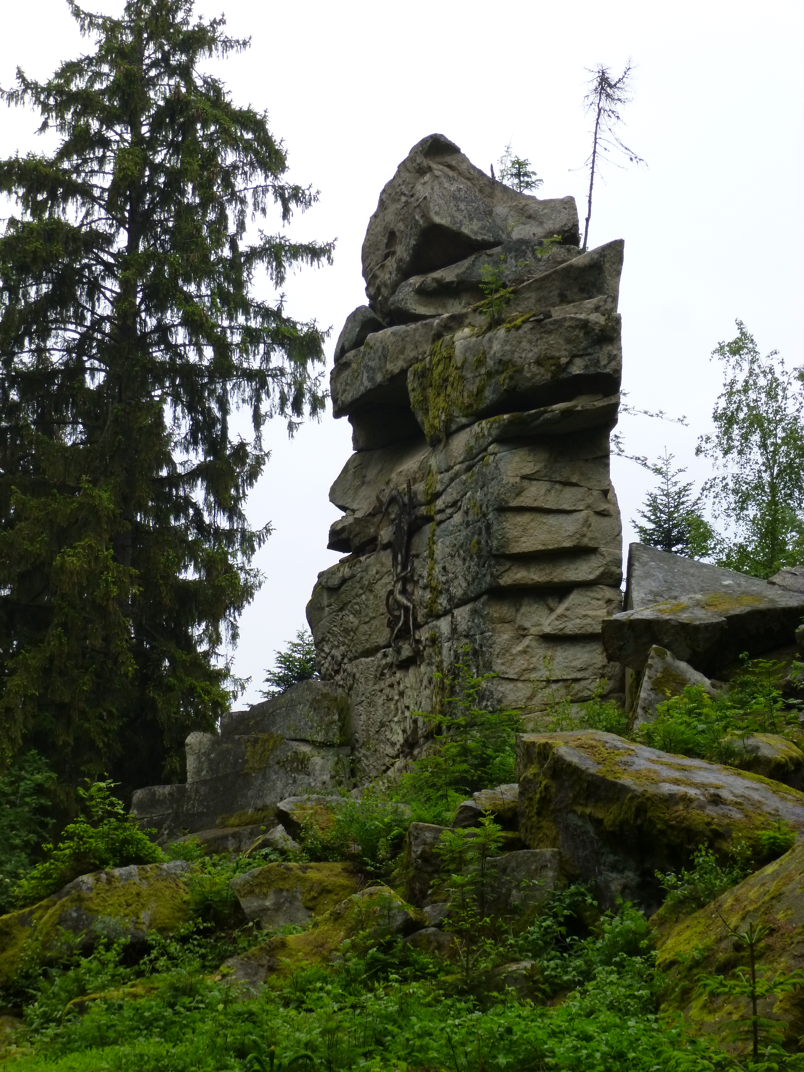 Die Teufelsmühle bei Oberstein gehört zu den Geotopen im Landkreis Straubing-Bogen mit der Nummer 278R009.